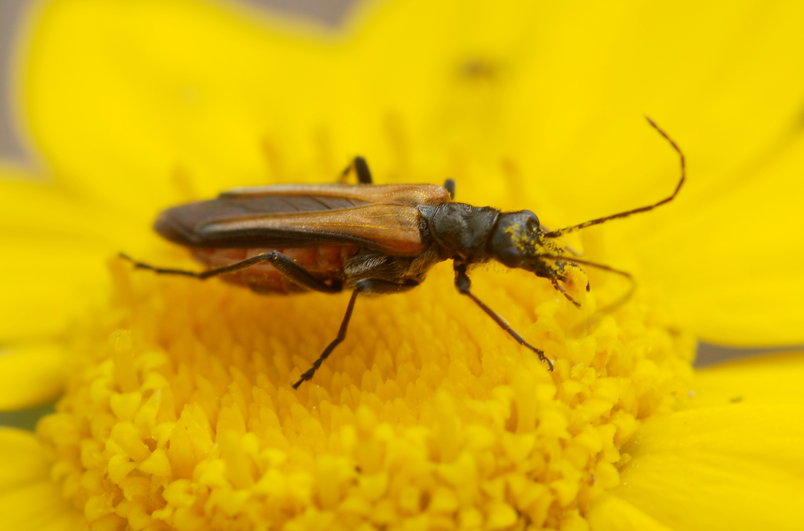 A false blister beetle (Oedemera simplex)